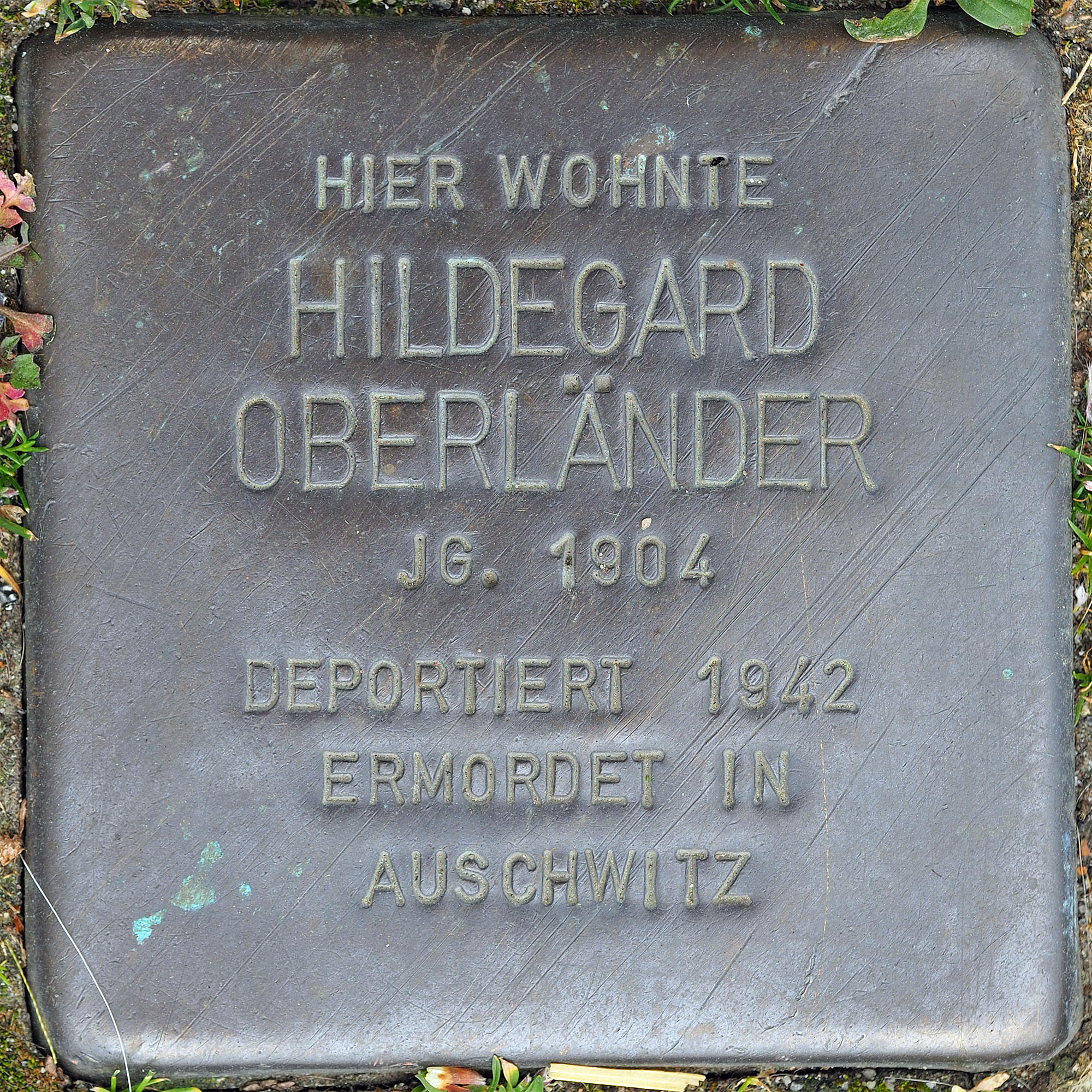 Stolpersteine MG: Oberländer, Hildegard